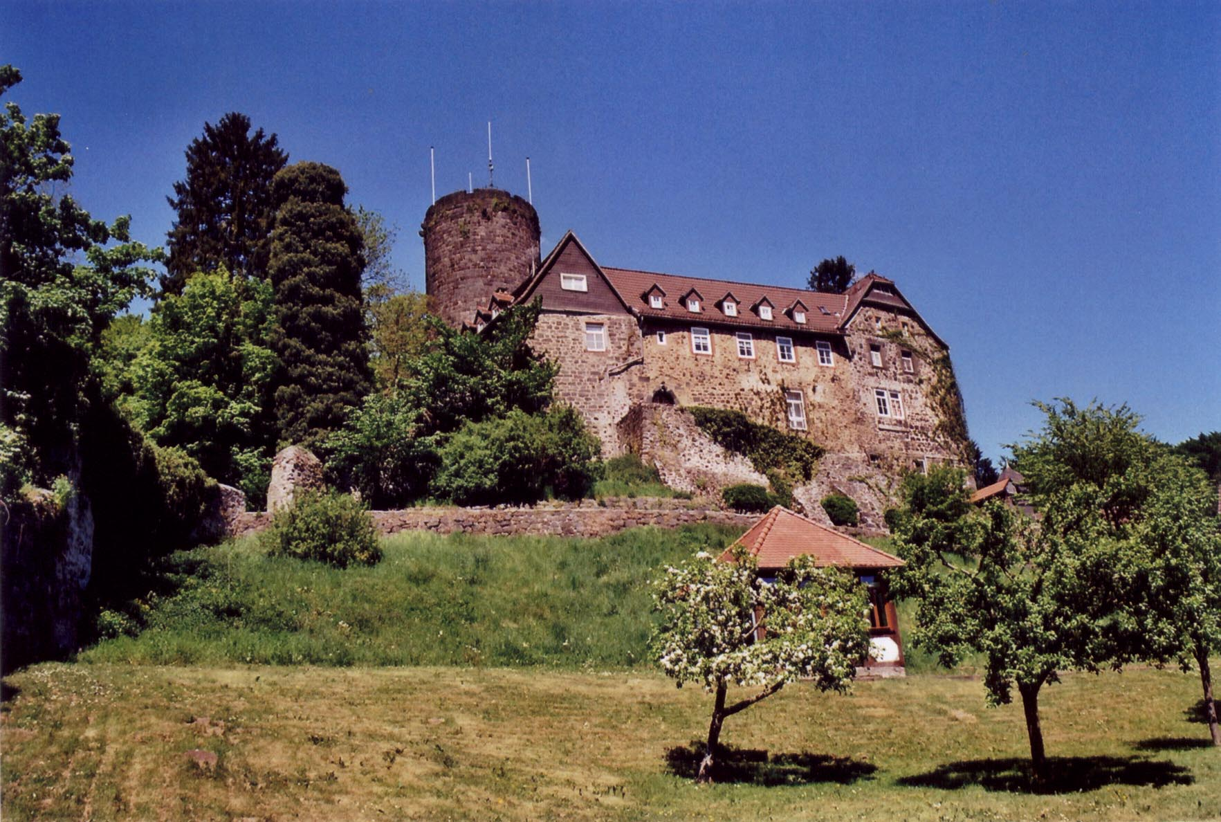 Burg Nordeck, Südseite